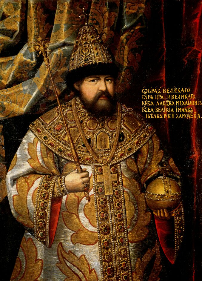 Неизвестный русский художник второй половины 17 века. Школа Оружейной палаты. Портрет царя Алексея Михайловича. Конец 1670 - начало 1680 годов Поступил в 1924 году из ГТГ До 1917 года находился в собрании князя Б.А. Куракина в имении Куракино Орловской губернии ГИМ инв. 55384 ИI-3462